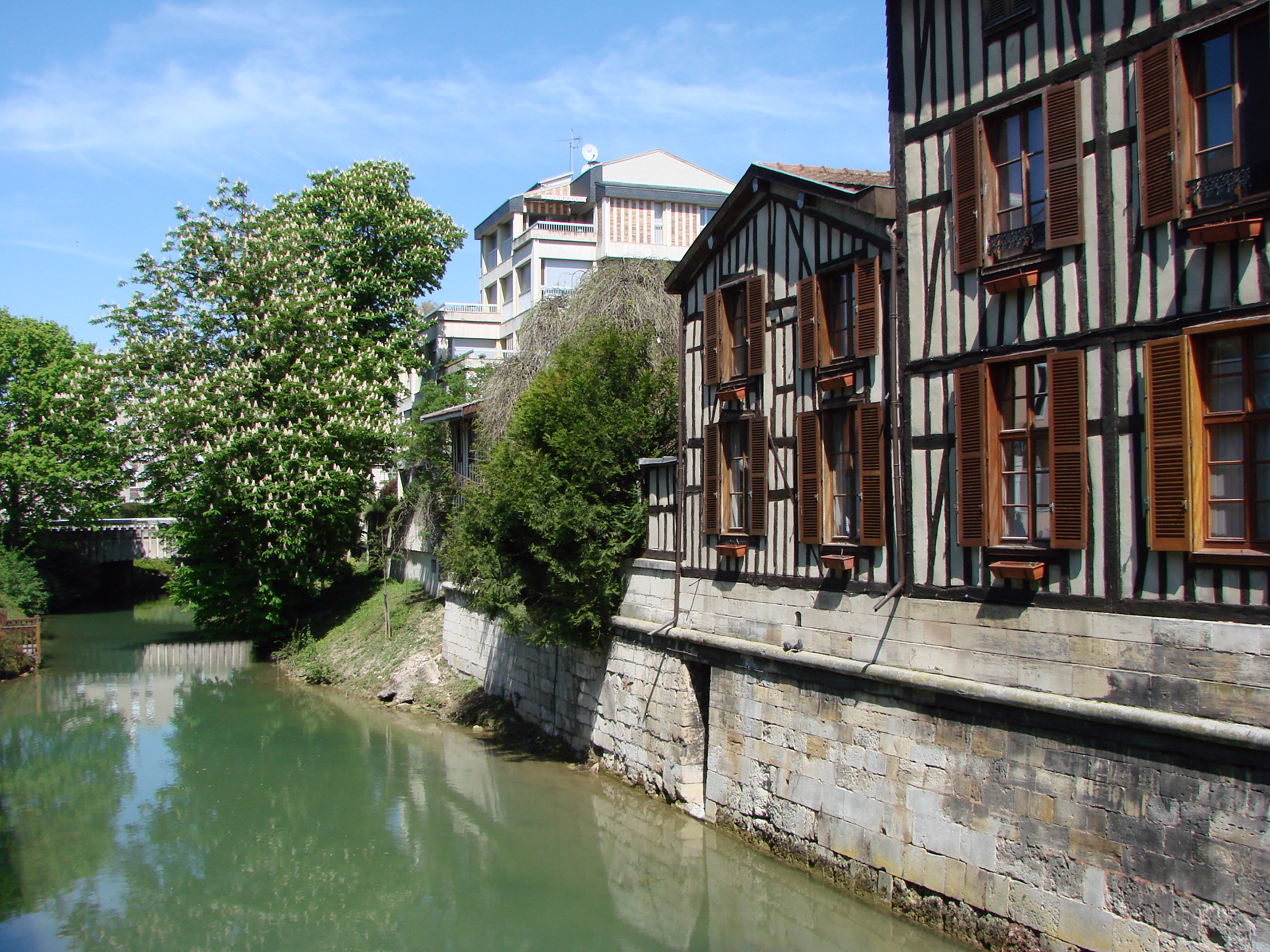 Le Nau, canal formé par par un petit bras de la Marne, traverse le centre de Châlons-en-Champagne.